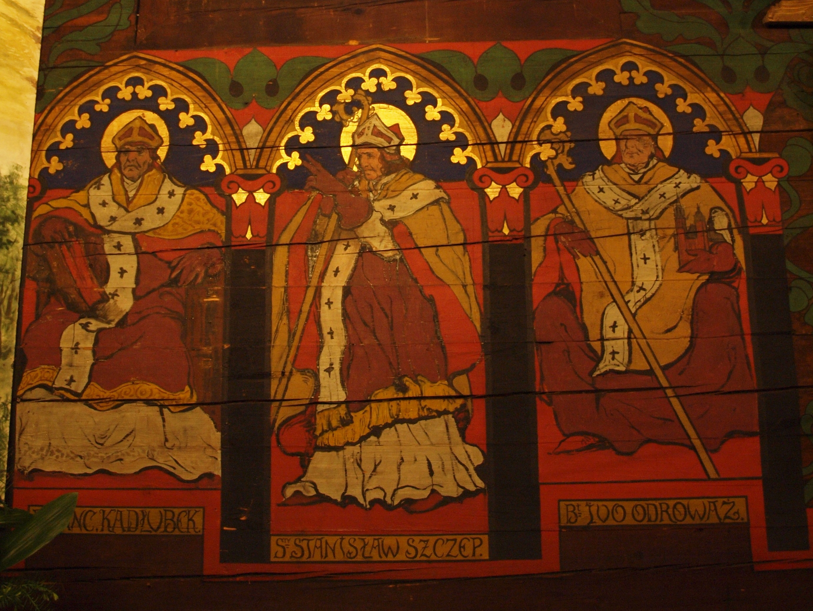 Wieliczka, Kościół św. Sebastiana. Polichromia